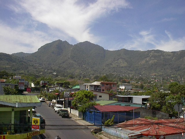 Paisaje general del pueblo de Escazú, Costa Rica y sus montañas. Al fondo el Cerro Pico Blanco (2,271 m.s.n.m.). Macizo montañoso que forma parte de las estribaciones más occidentales de la Cordillera de Talamanca.